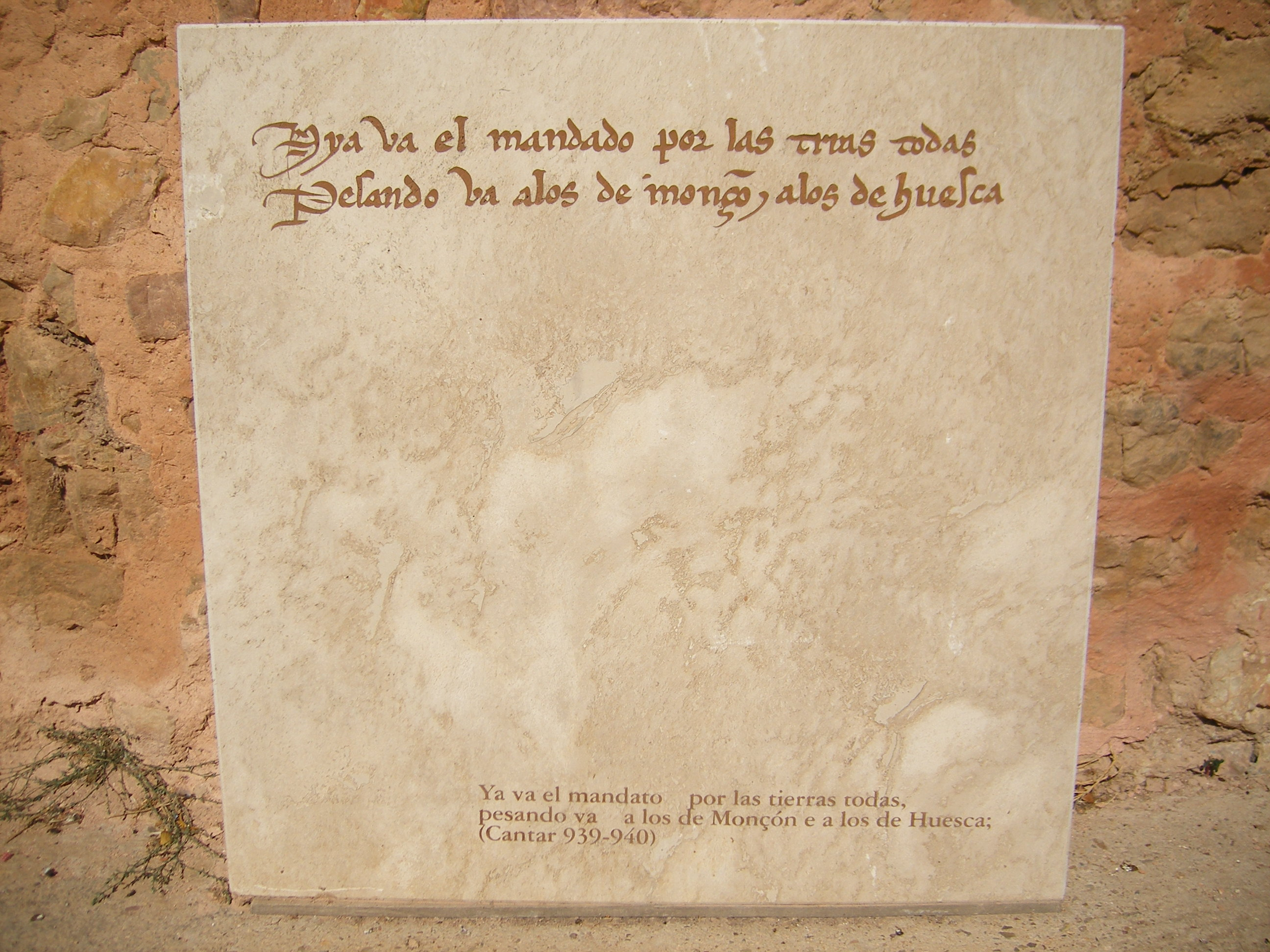 Placa situada a los pies de la Iglesia de la Asunción de Monforte (Aragón), que conmemora el paso del Cid Campeador por este municipio. En esta placa se pueden leer los versos 939-940 del Cantar de mio Cid. Hya va el mandado por las tierras todas, pesando va a los de Monçon [Monforte] e a los de Huesca [Huesa].